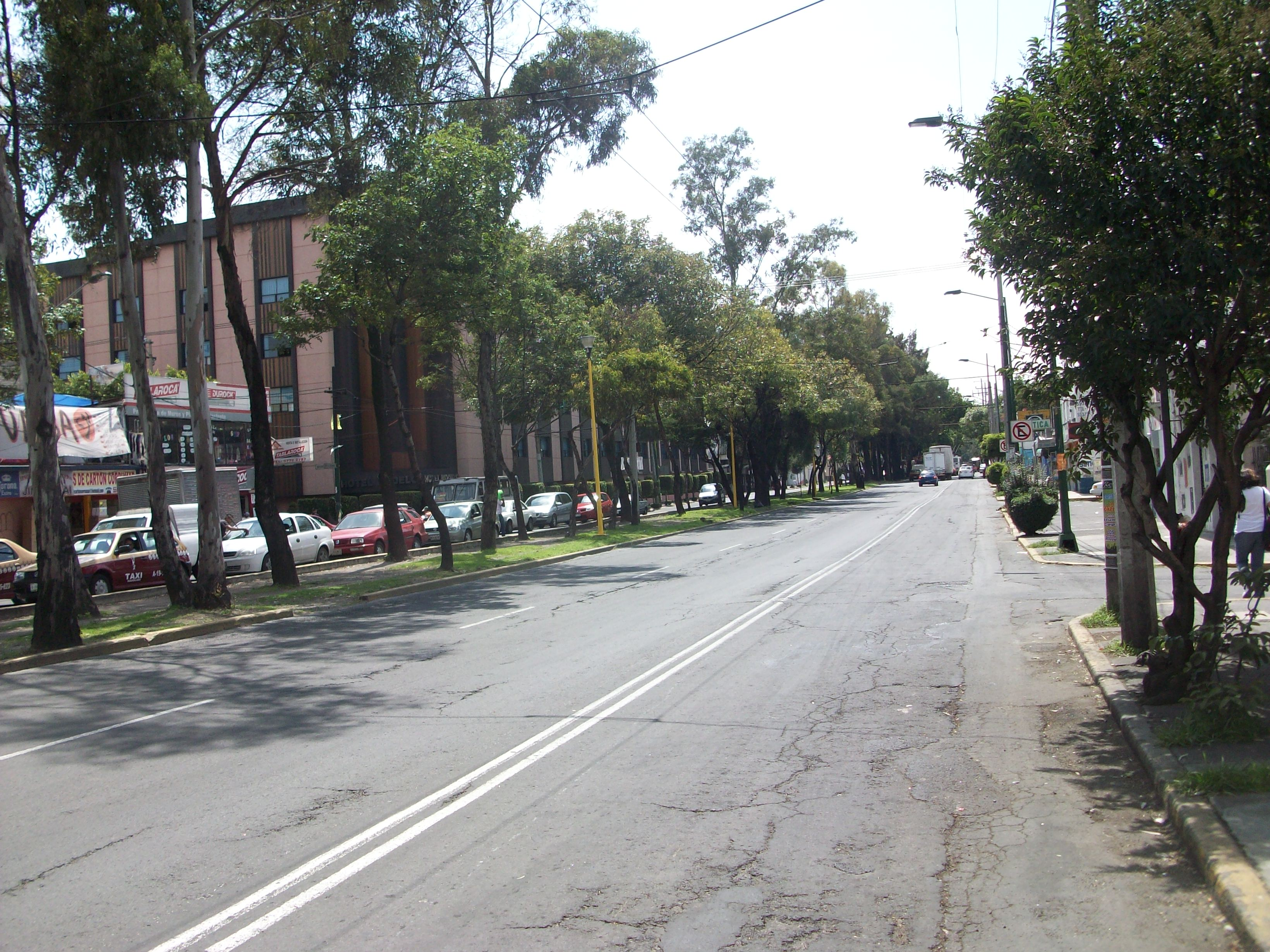 Avenida Alfredo Robles Dominguez